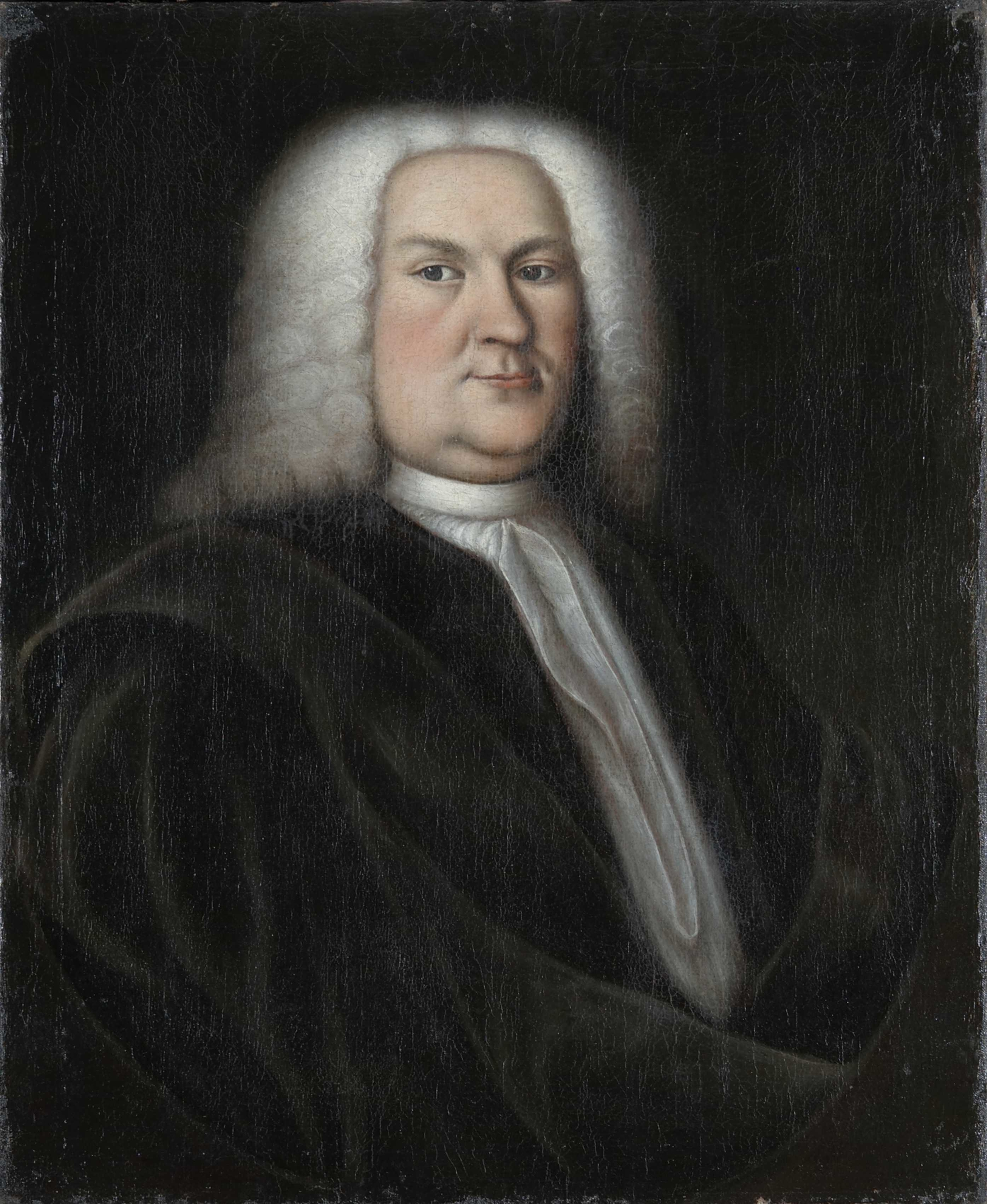 Portrett av Jacob Rasch fra begynnelsen av 1700-tallet. Rasch var rektor ved Oslo katedralskole 1706–1737.